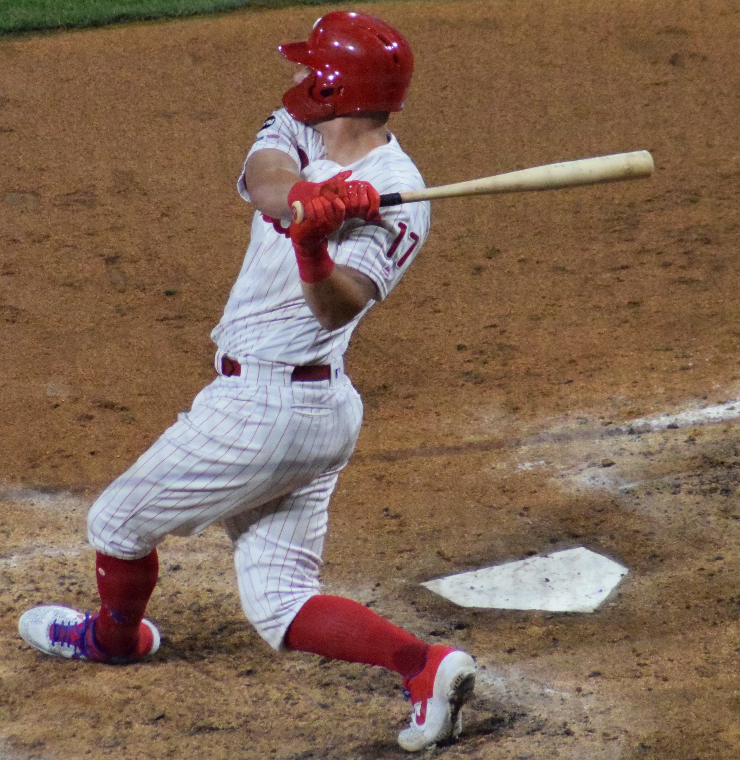 Rhys Hoskins